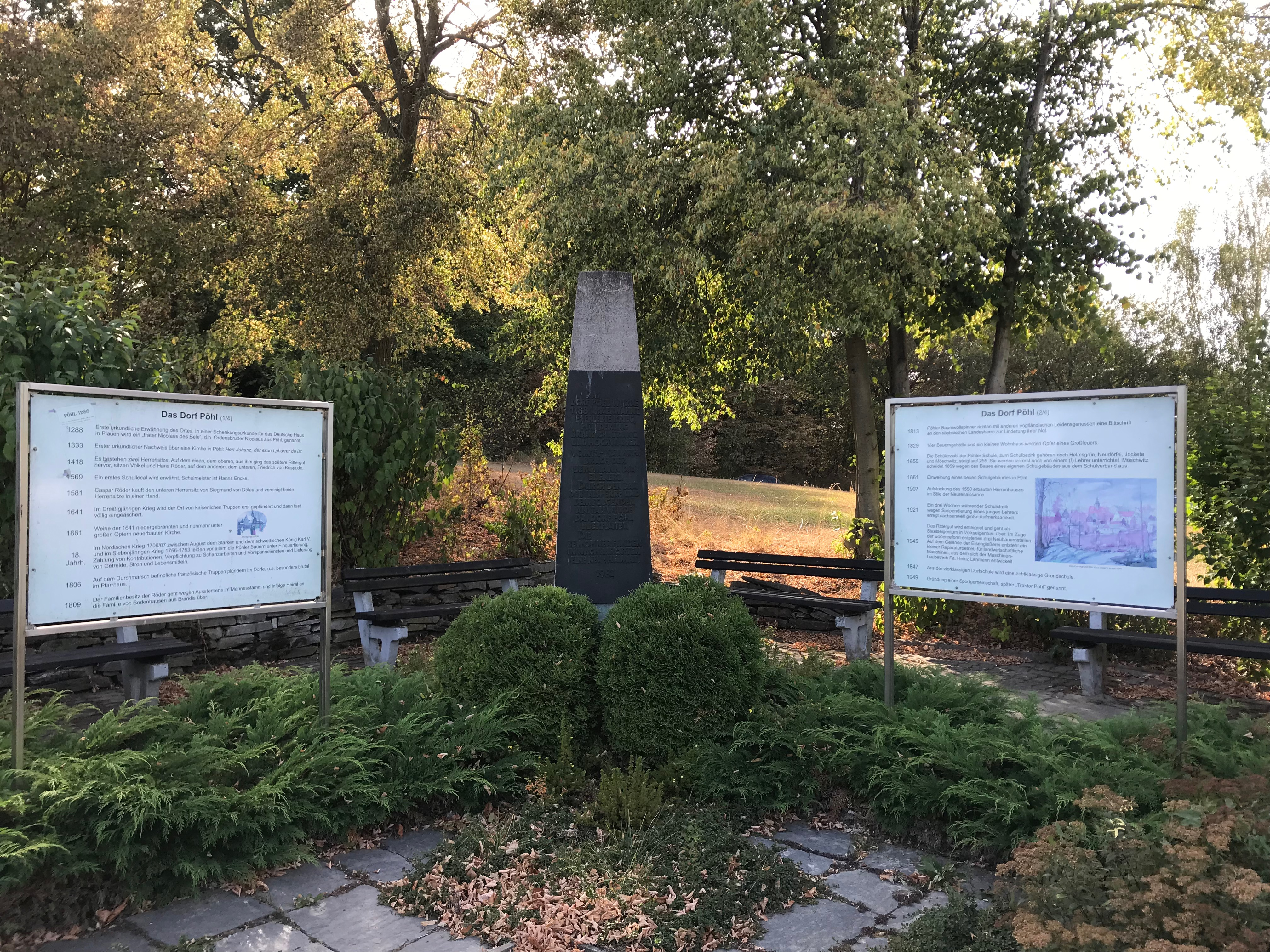 Denkmal für das alte Pöhl